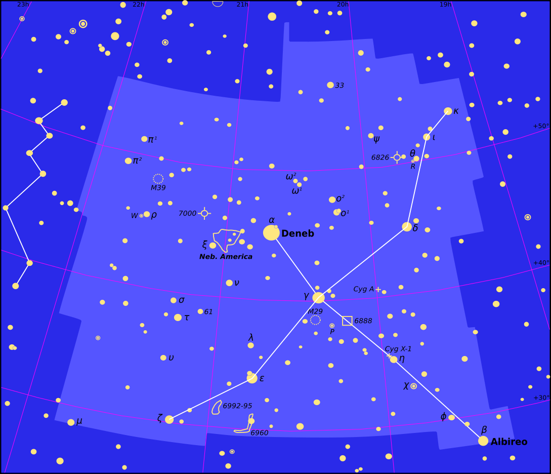 Constellacion dau Cigne.